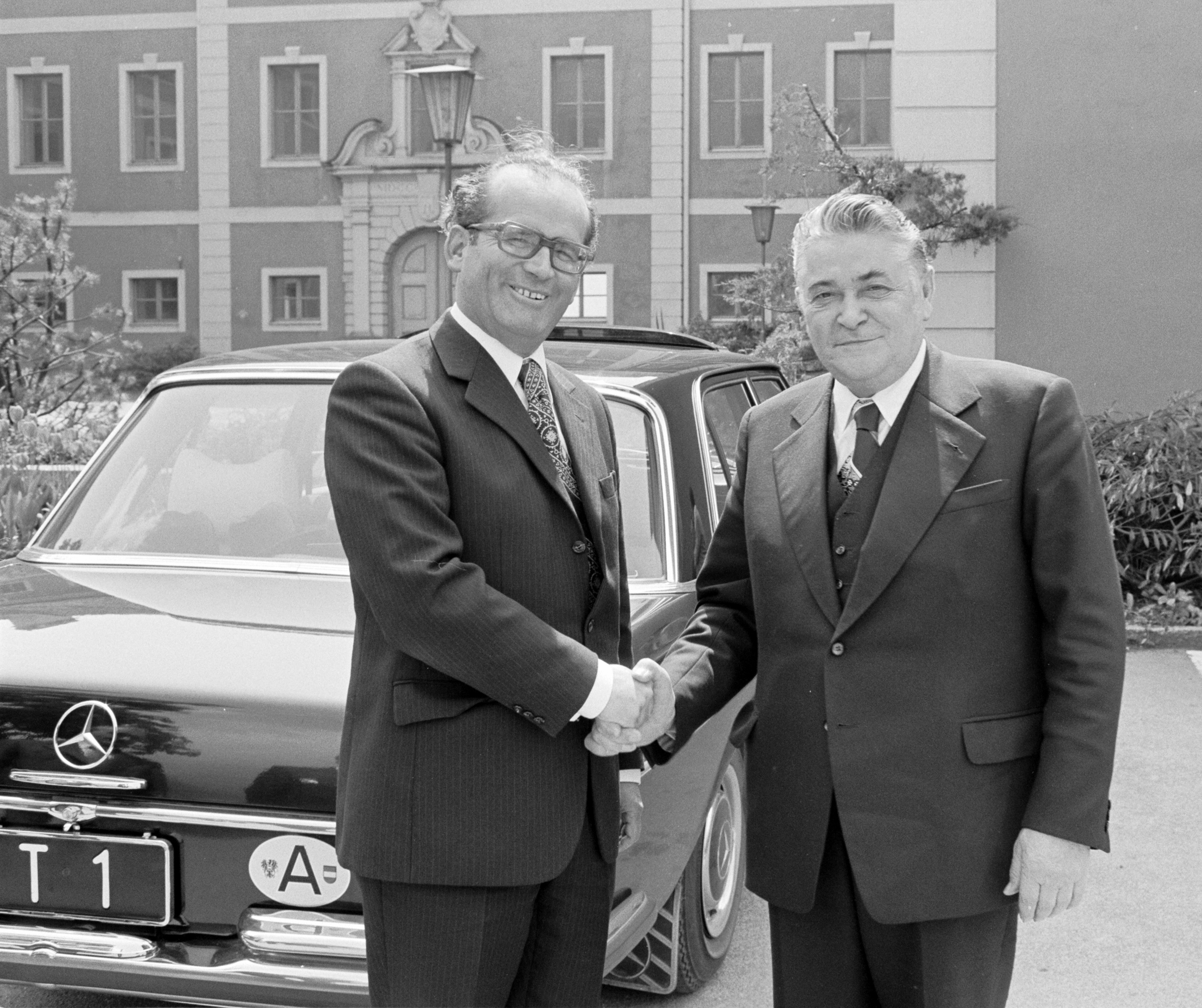 Tiroler Landesregierung zu Besuch in Vorarlberg: Herbert Keßler und Eduard Wallnöfer